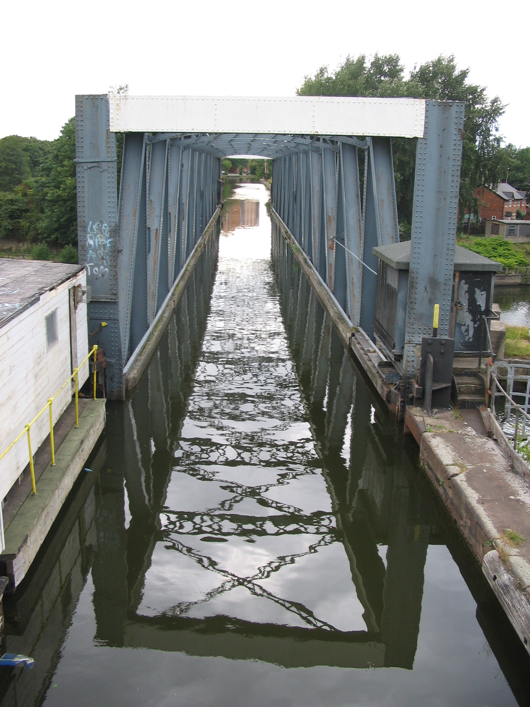 Barton Swing Aquaduct op het Bridgewater Canal te Barton - eigen foto - augustus 2006